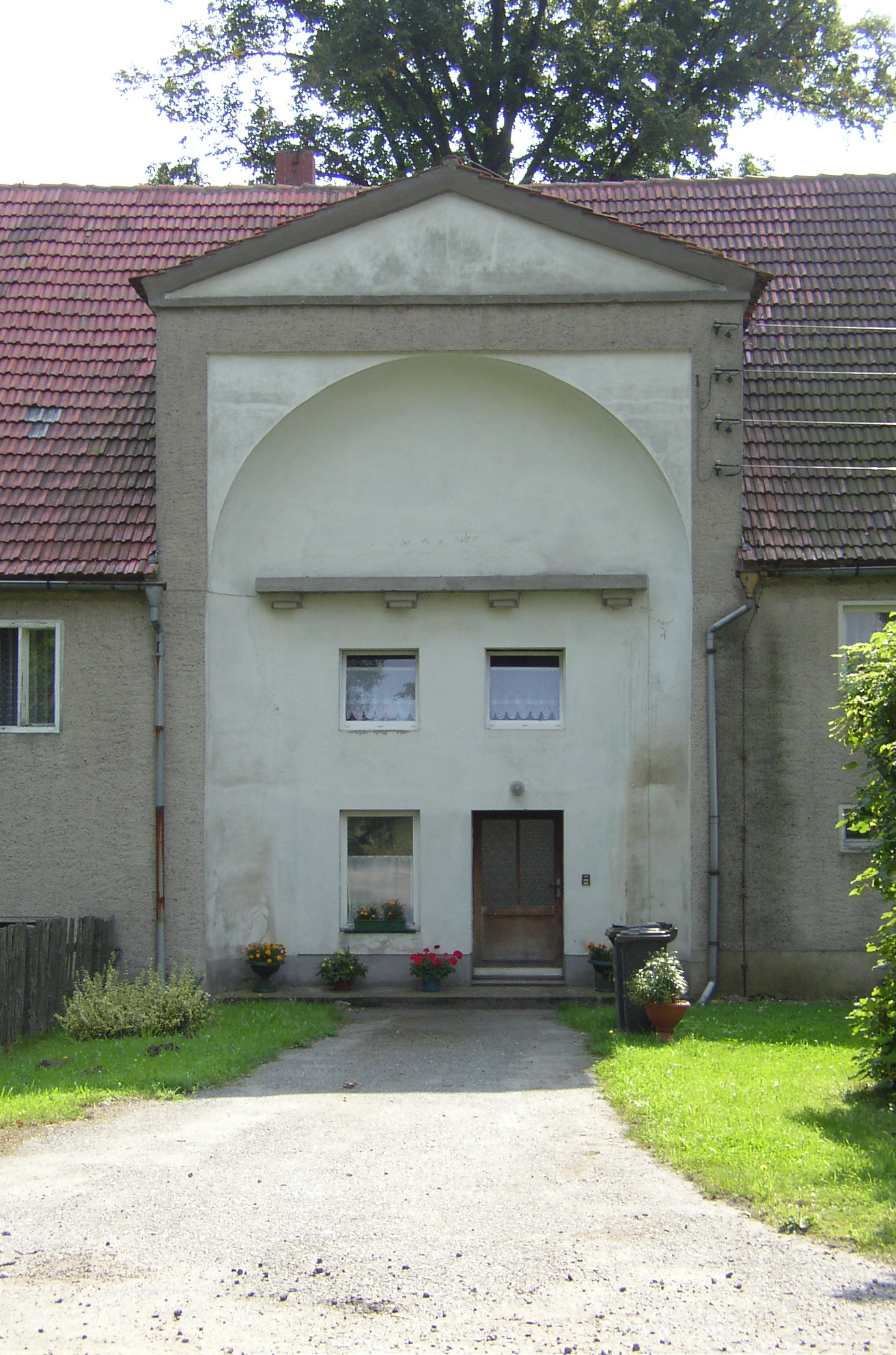 Vorwerk Kleindrebnitz, gebaut von Gottlob Friedrich Thormeyer, ehemaliges Zuhause von Max Neumeister. Wichtige Elemente der historischen Bausubstanz gingen während der DDR verloren.